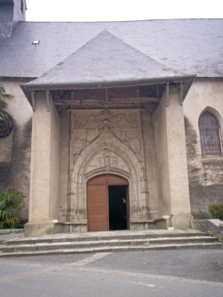 Portau de la glèisa de La Seuva